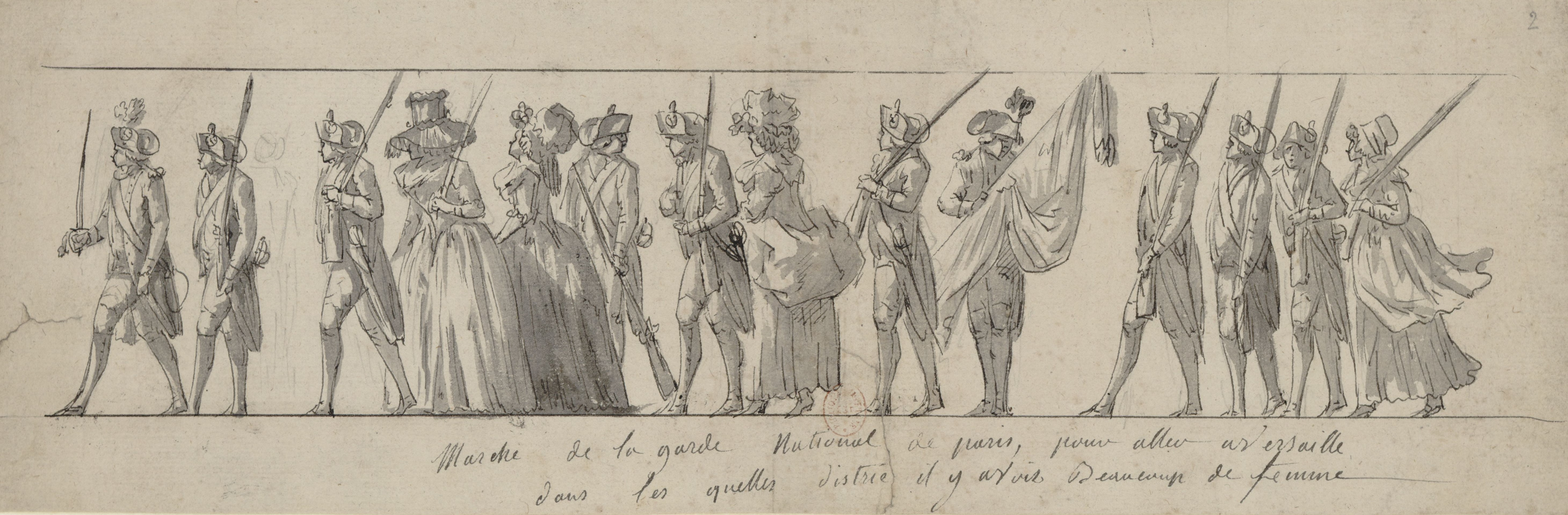 5 & 6 octobre 1789 - titre d'origine